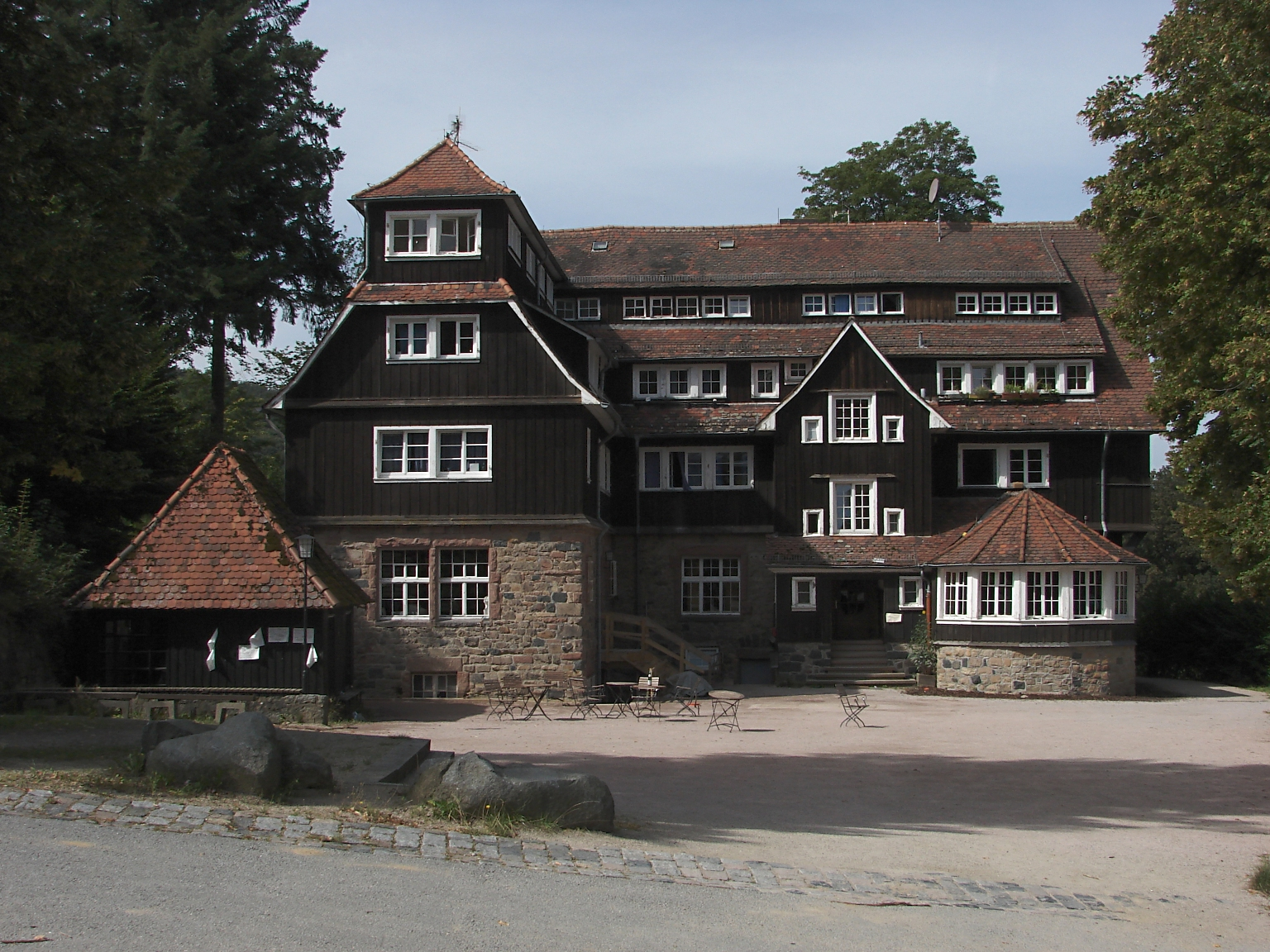 Odenwaldschule in Heppenheim-Oberhambach, Goethehaus